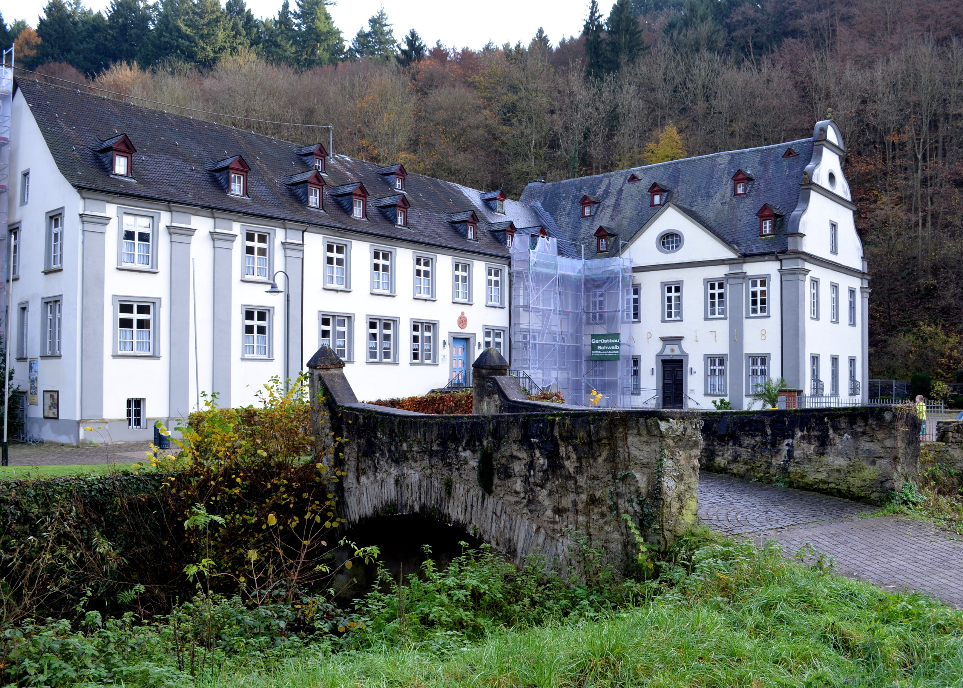 abdijgebouwen